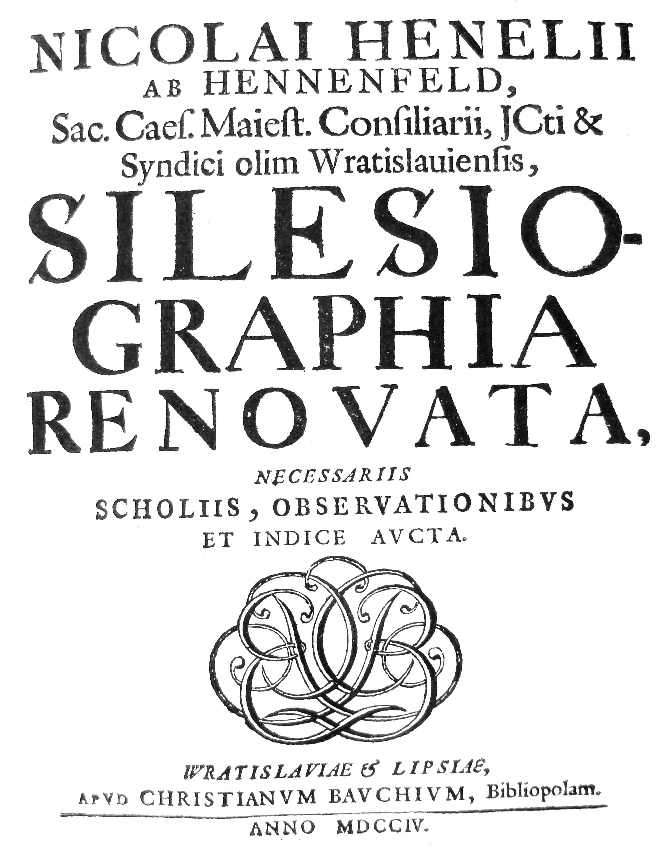 Strona tytułowa Silesiographia renovata necessariis scholiis, observationibus et indice aucta Mikołaja Henela